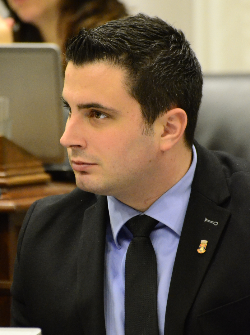 Laurent Proulx lors de la séance du conseil municipal de la ville de Québec